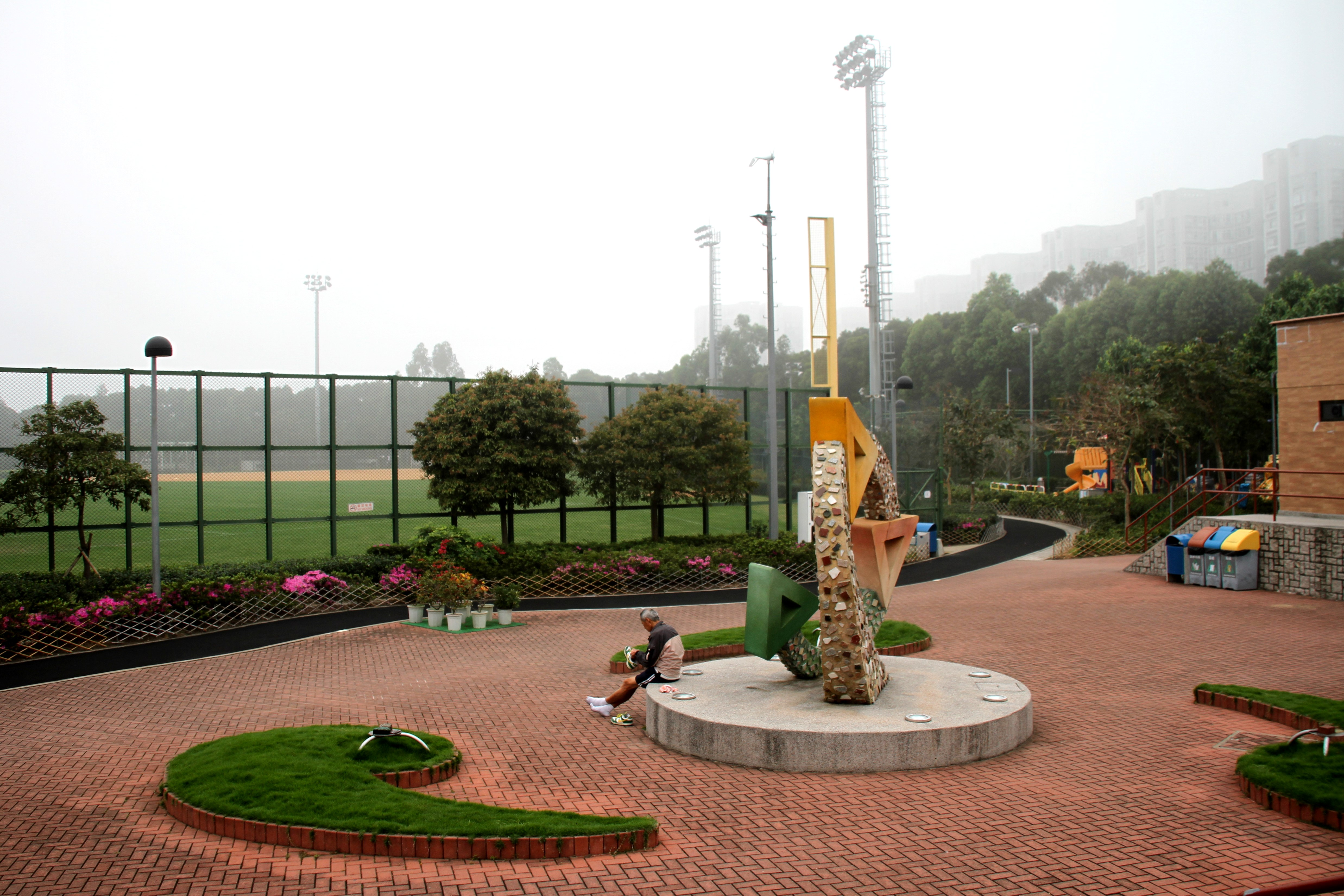 香港藍田晒草灣遊樂場